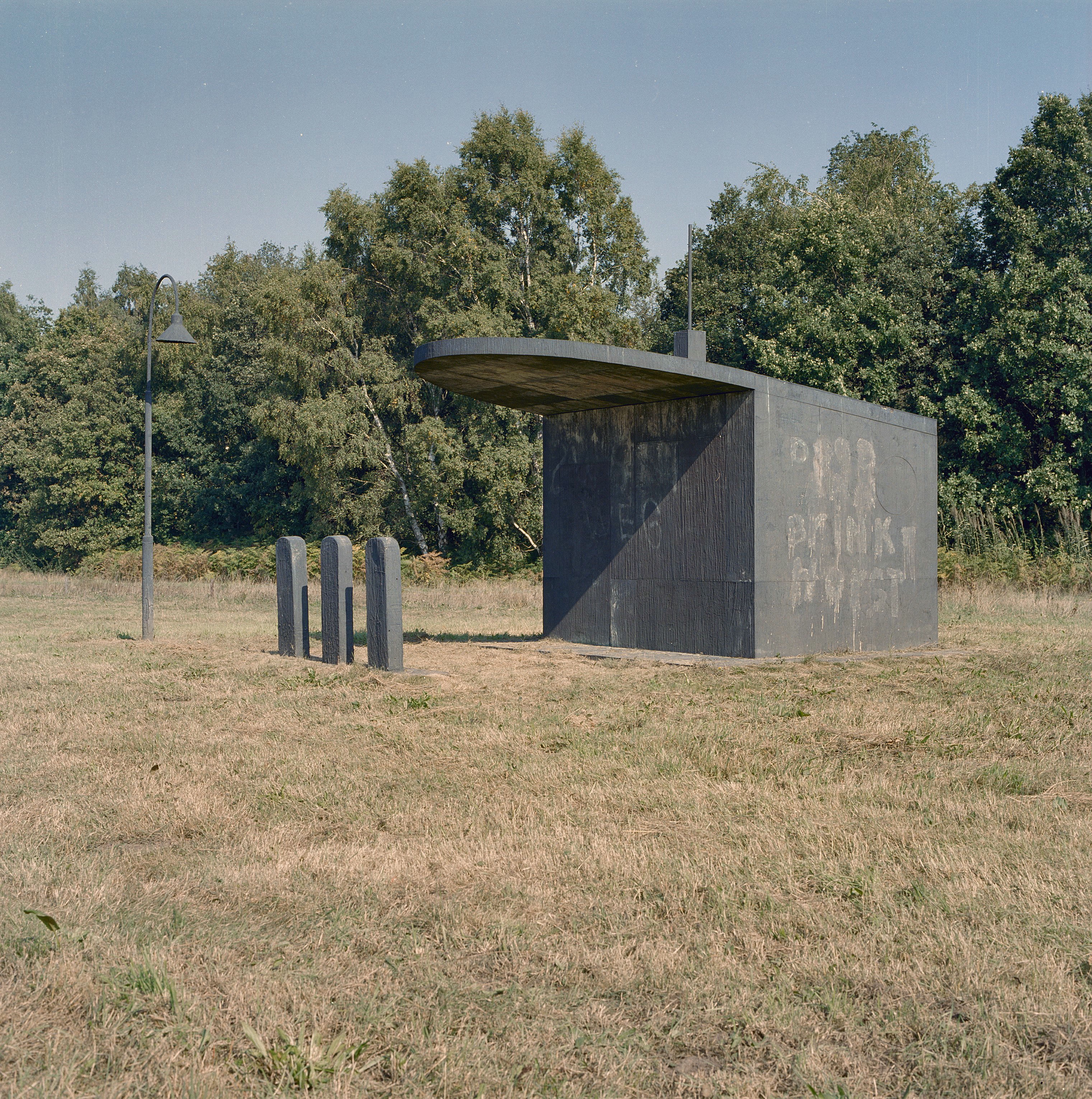 Kunstwerk benzinestation: kiosk met lantaarn en pompeiland: Overzicht kiosk met lantaarn en pompeiland. Dit kunstwerk ligt tussen Lunteren en Barneveld langs de A30